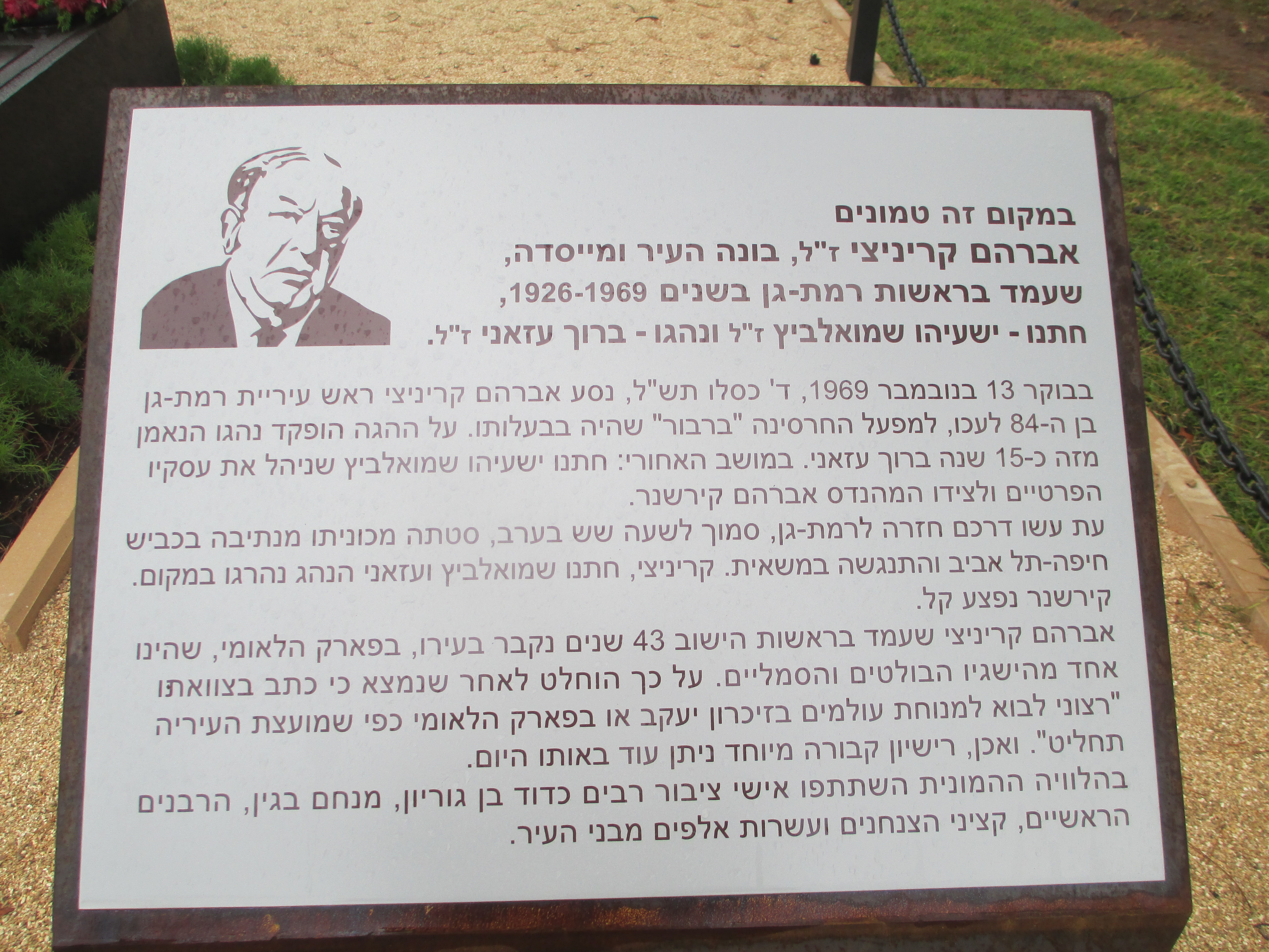 שלט הנצחה בחלקת הקבר של אברהם קריניצי בפארק הלאומי ברמת גן